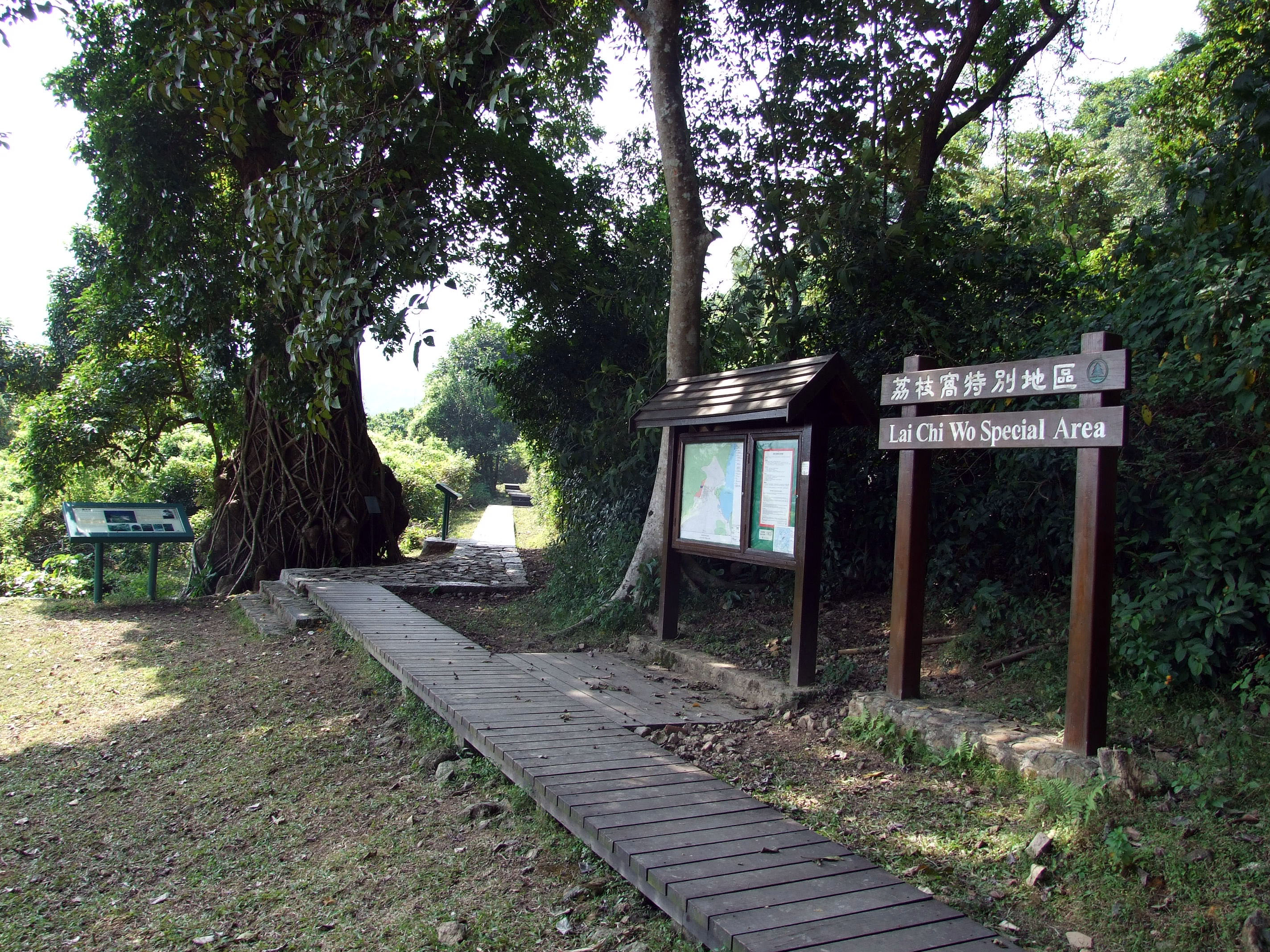 中文（香港）: 荔枝窩特別地區